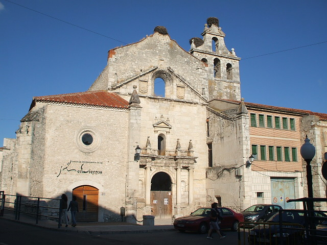 Fachada de la iglesia conventual de San Francisco de Cuéllar